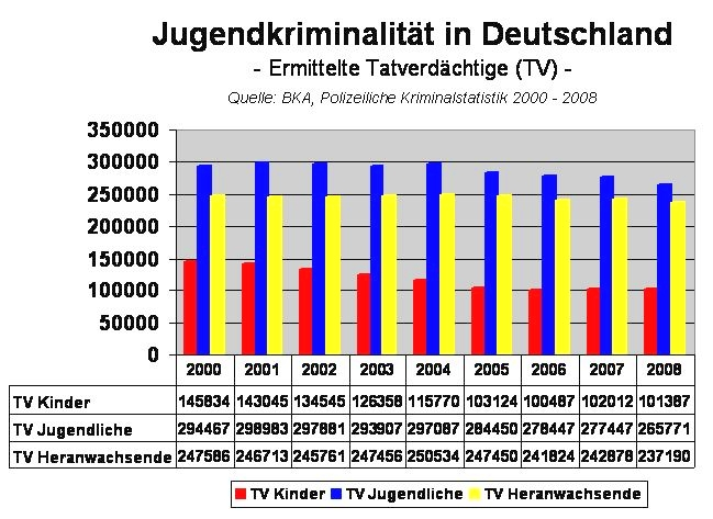 Jugendkriminalität 2000 – 2006, Germany